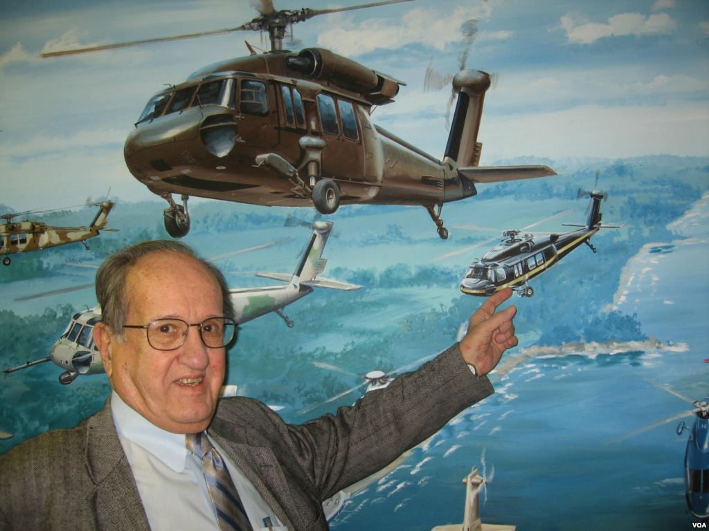 Игорь Игоревич Сикорский